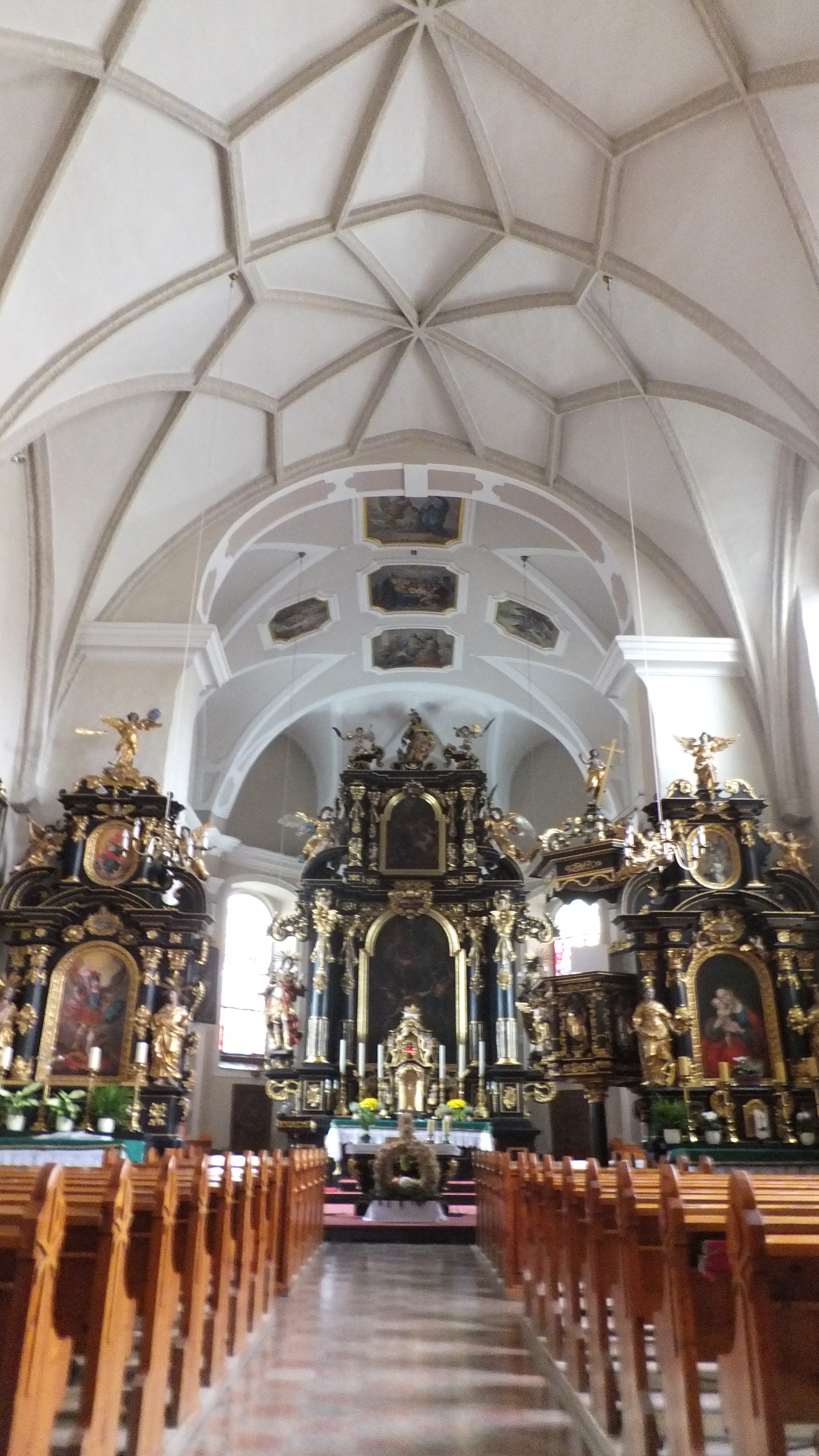 Kath. Pfarrkirche hl. Stefan - Innenansicht hoch, Weibern